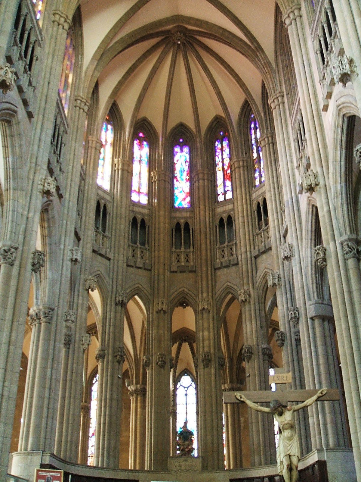 Nave alta de la Capilla Mayor de la Catedral Nueva de Vitoria-Gasteiz